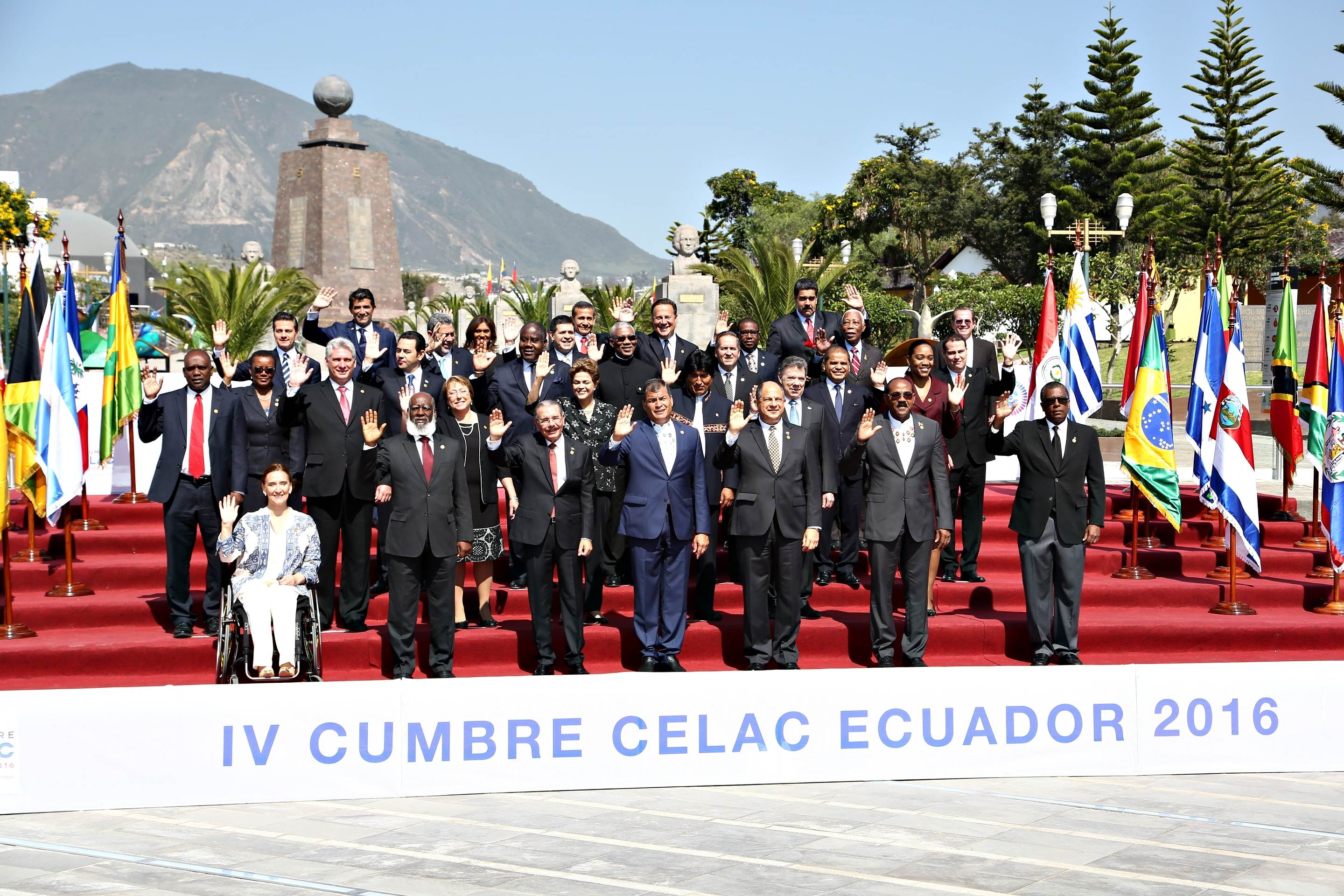 La vicepresidente Gabriela Michetti asiste a la cumbre la Comunidad de Estados Latinoamericanos y del Caribe (CELAC), en la ciudad de Quito, capital de Ecuador. Michetti, que fue recibida por el presidente de Ecuador, Rafael Correa, asistió al encuentro acompañada por la canciller Susana Malcorra.